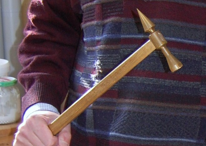 Ein "Stimmhammmer" zum Stimmen von Orgelpfeifen, also ein kleines Stimmhorn an einem langen Holzstiel